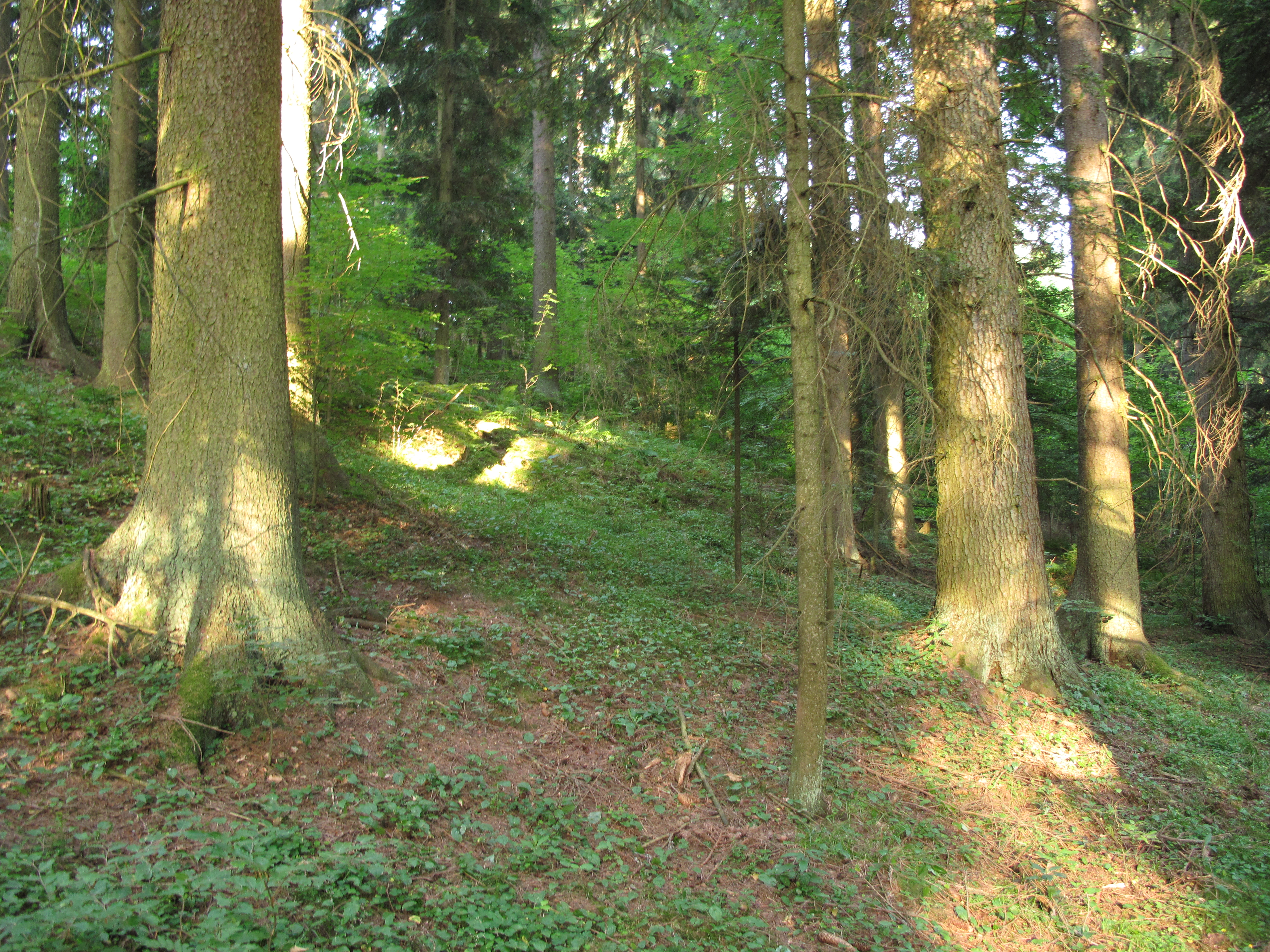 Přírodní památka Žestov. Okres Český Krumlov, Česká republika.